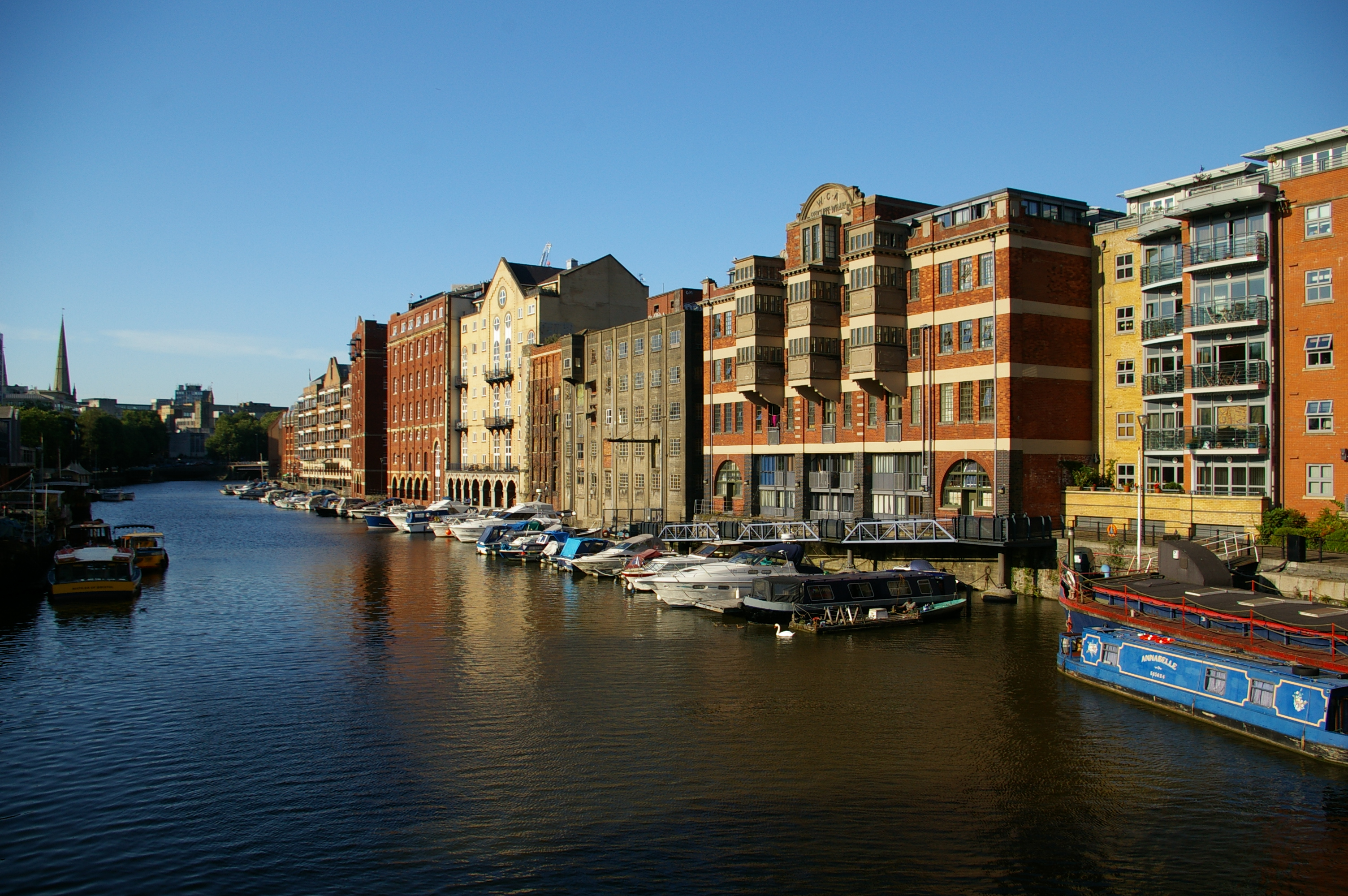 Bristol Moorings